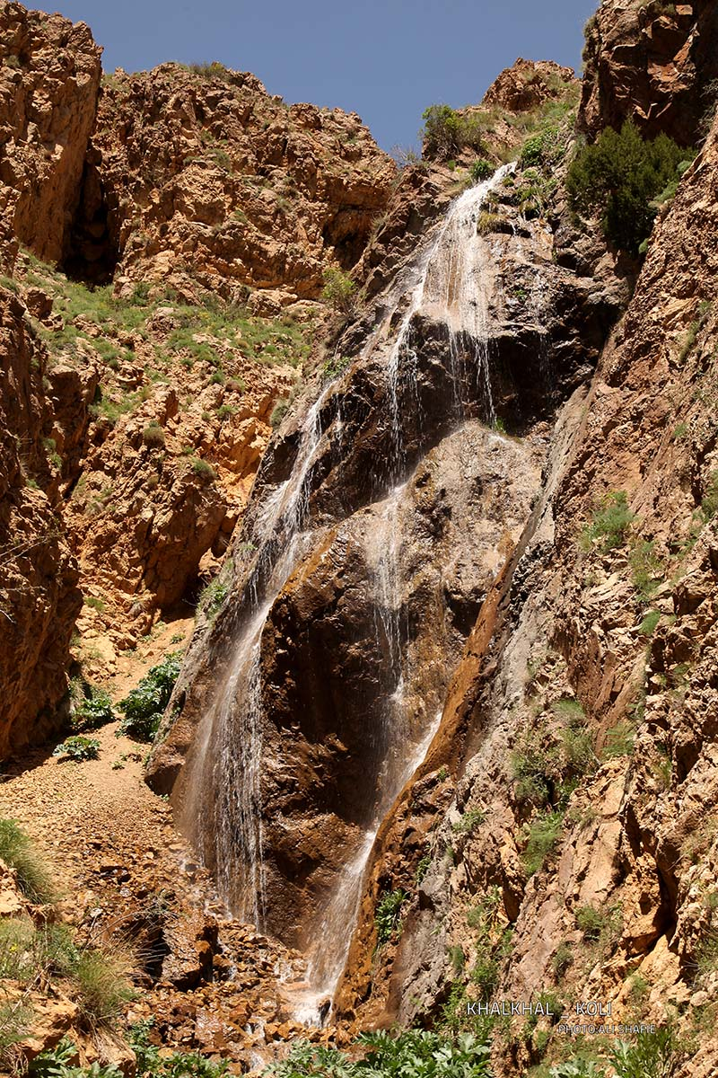 آبشار قارا قوش قیسی در روستای کلی